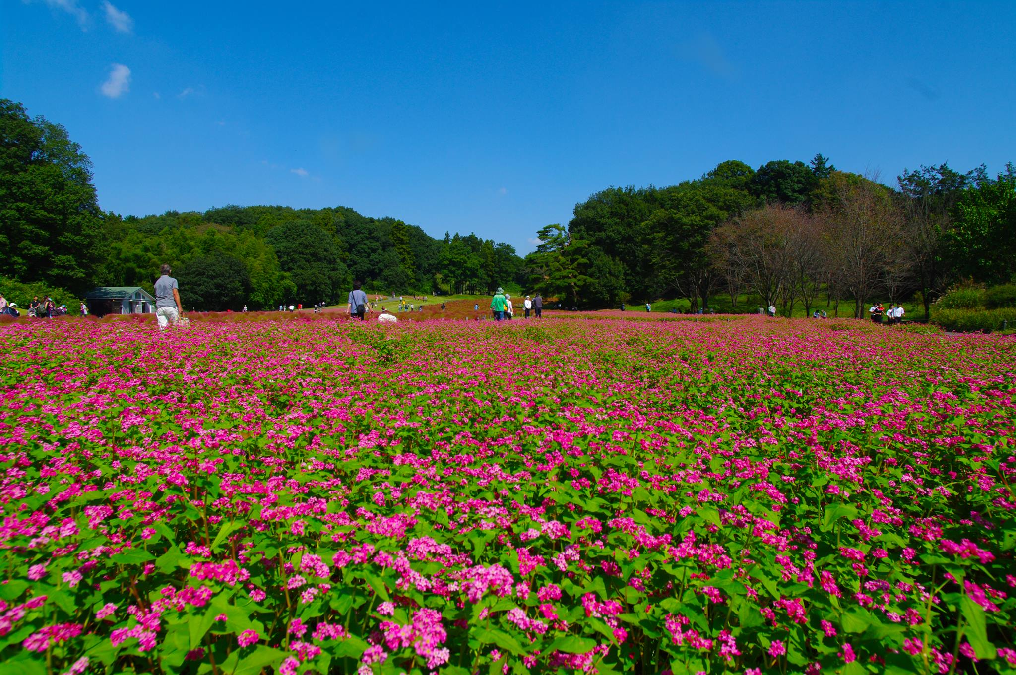 運動広場・赤ソバ